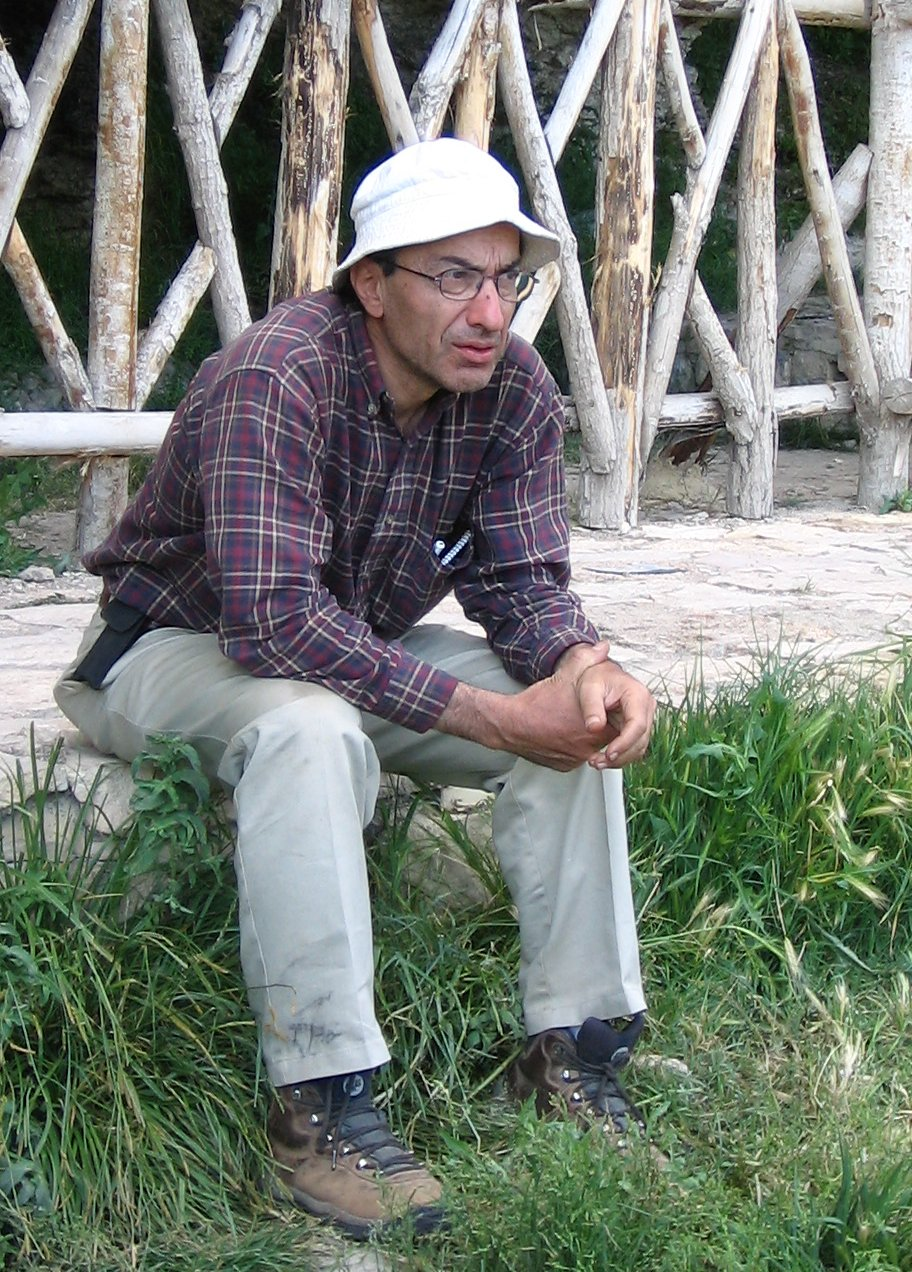 Ali Parsa, Iranian Academic.